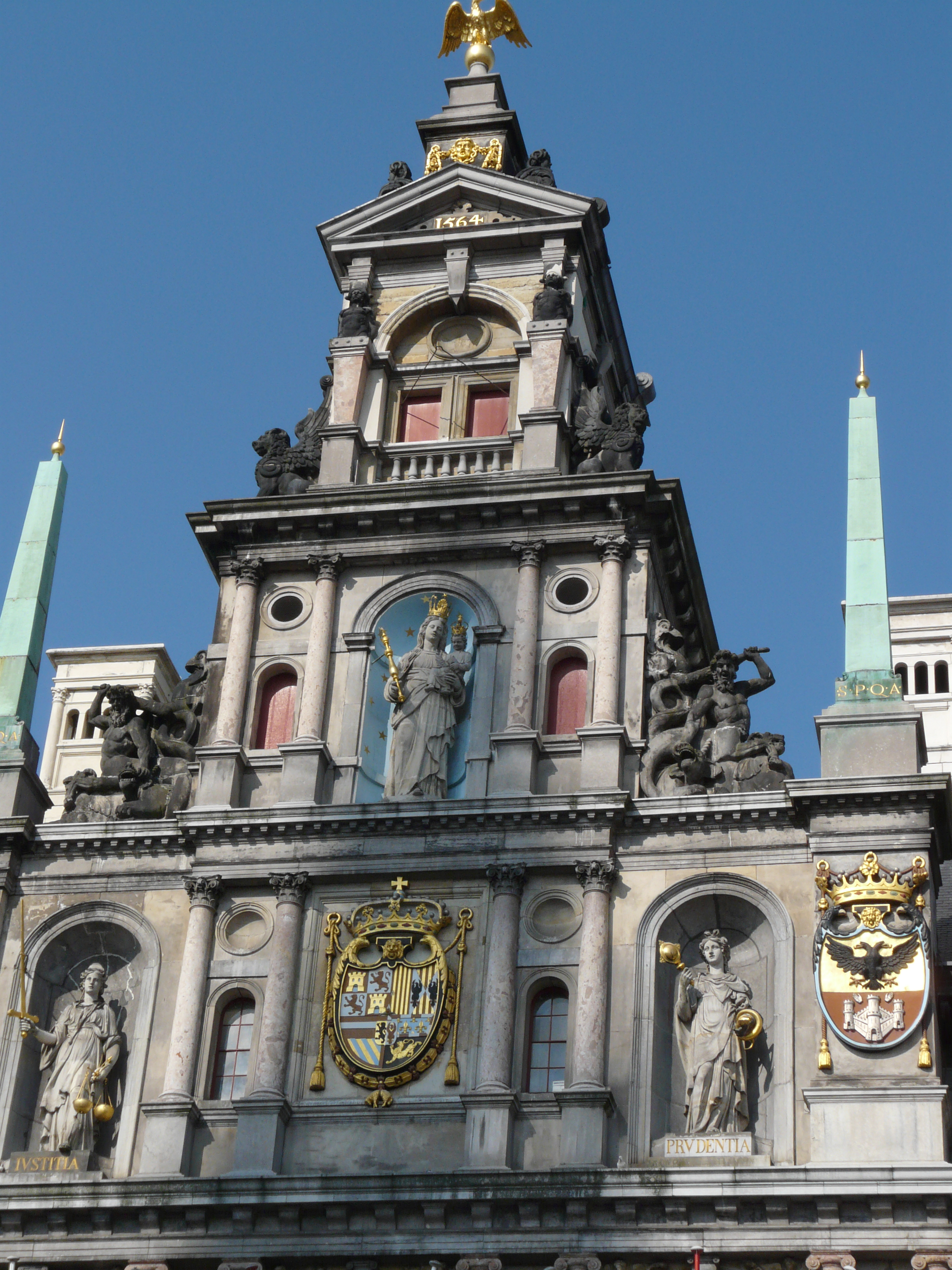 Voorgevel van het stadhuis Antwerpen in Antwerpen